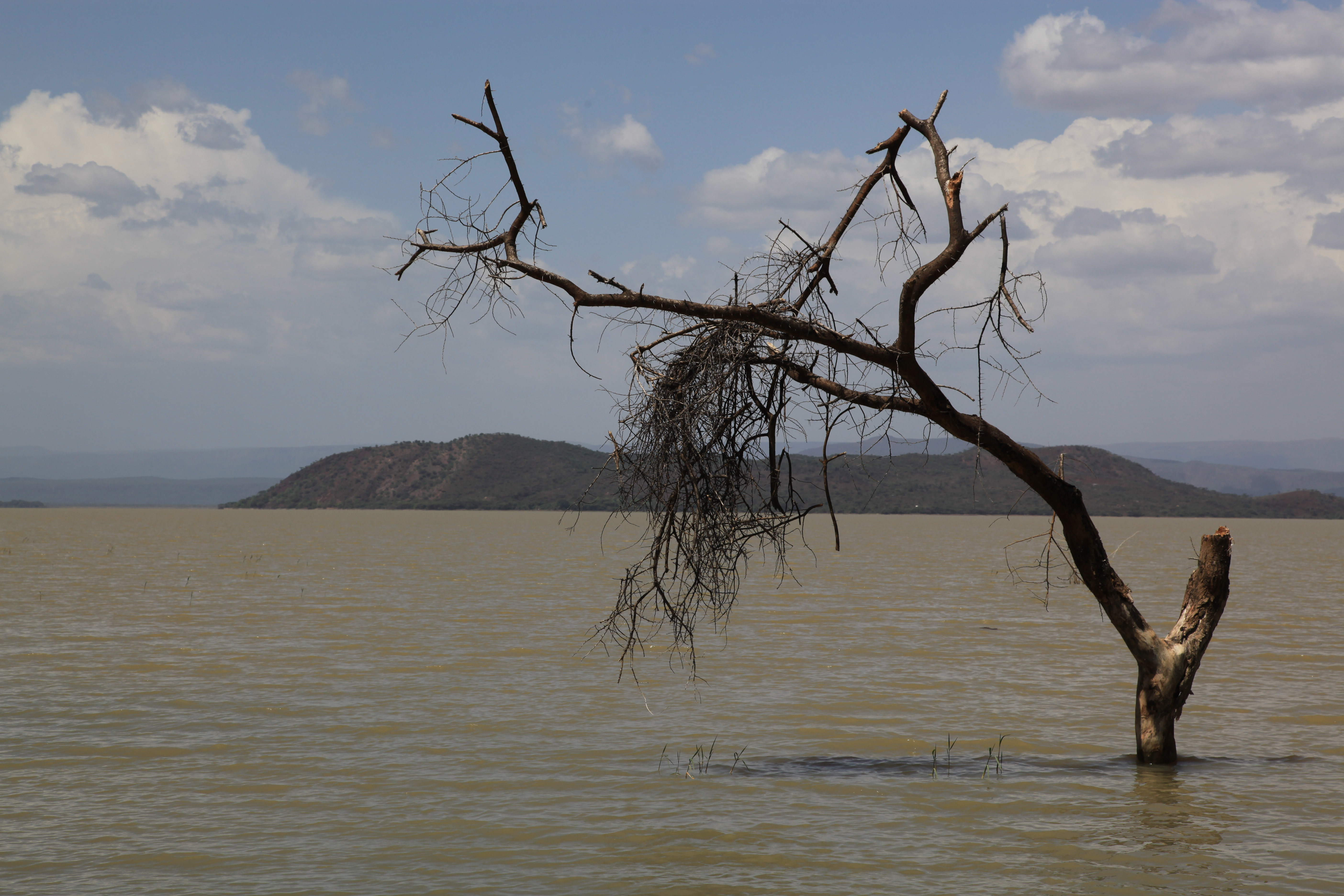 Kenya, May 2009